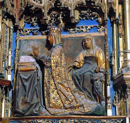 Retablo Mayor de la Cartuja de Miraflores (Burgos). Isabel la Católica. Fue Isabel la Católica quien encargó este retablo a Gil de Silóe para conmemorar a sus padres, Juan II e Isabel de Portugal, enterrados en la cabecera de la iglesia. No cabe duda de que la reina también quiso estar representada en tan magna obra, junto a su marido Fernando, arrodillados y vestidos con sus mejores galas, presentados por sus santos titulares. Las dos figuras están de perfil, coronados y con las manos enguantadas, una muestra más del buen hacer de Silóe y de su colaborador en la pintura, Diego de la Cruz.